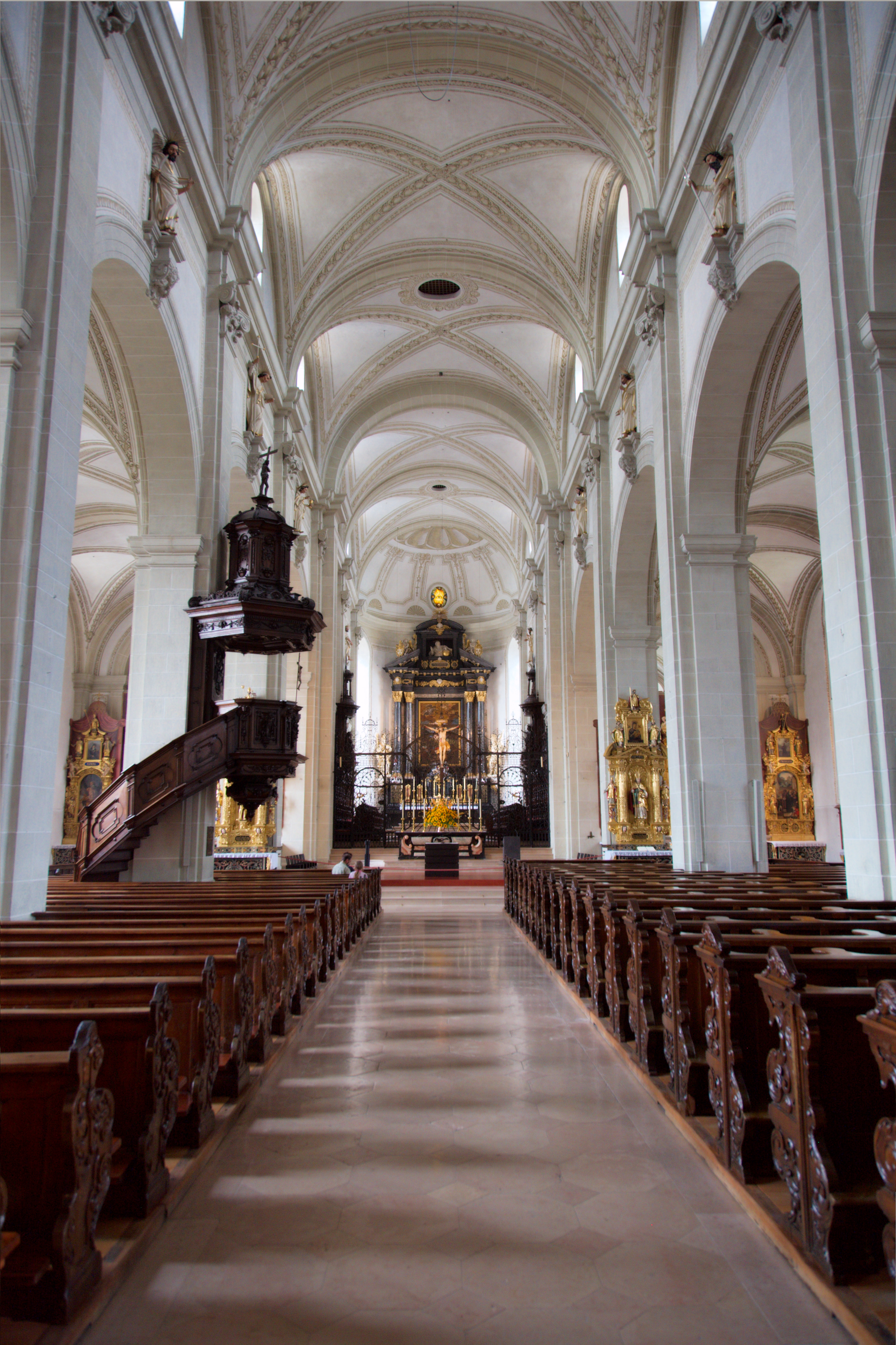 St. Leodegar im Hof